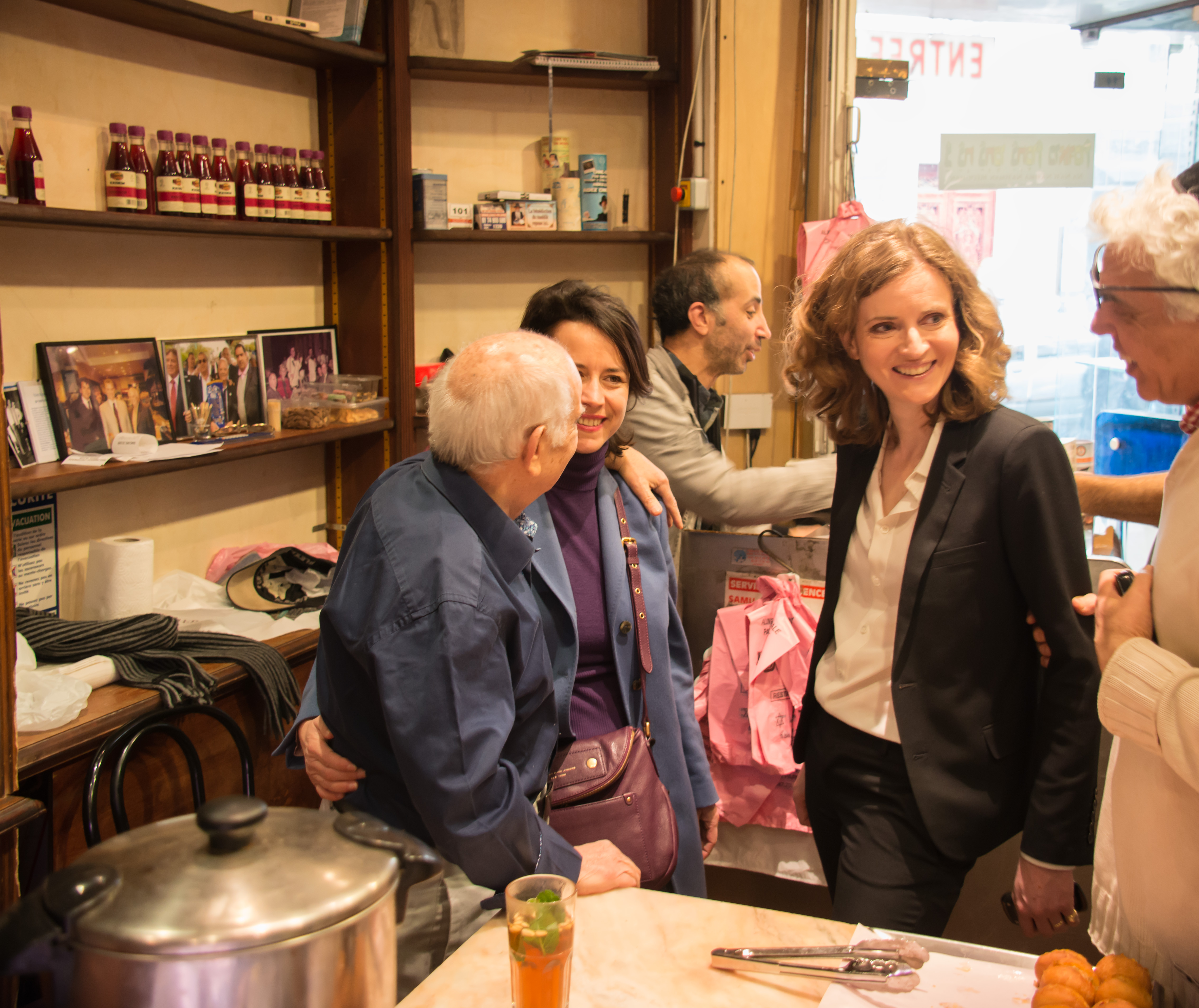 Rencontre de Nathalie Kosciusko-Morizet avec les commerçants du 9e arrondissement pendant la campagne municipale, avec Delphine Bürkli, tête de liste du 9e arrondissement, le 10 mars 2014.